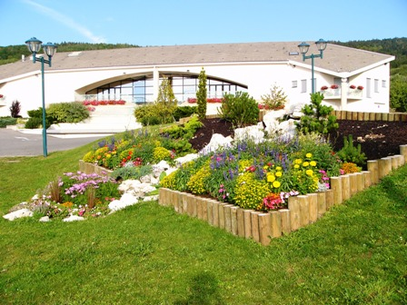 Salle de Fêtes Espace Loisirs